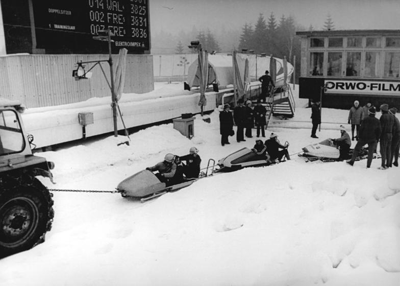 Oberhof, Meisterschaften im Zweier-Bob, Rücktransport zum Start ADN-ZB Demme 12-1-74 Oberhof: DDR-Meisterschaften im Zweier-Bob und BSG-Pokalwettkämpfe vom 11. bis 13.1.1974-Training am 11.1.74-Nach Zielankunft bringt ein Trecker die Zweier-Bobs mit ihren Besatzungen wieder zum Startplatz.